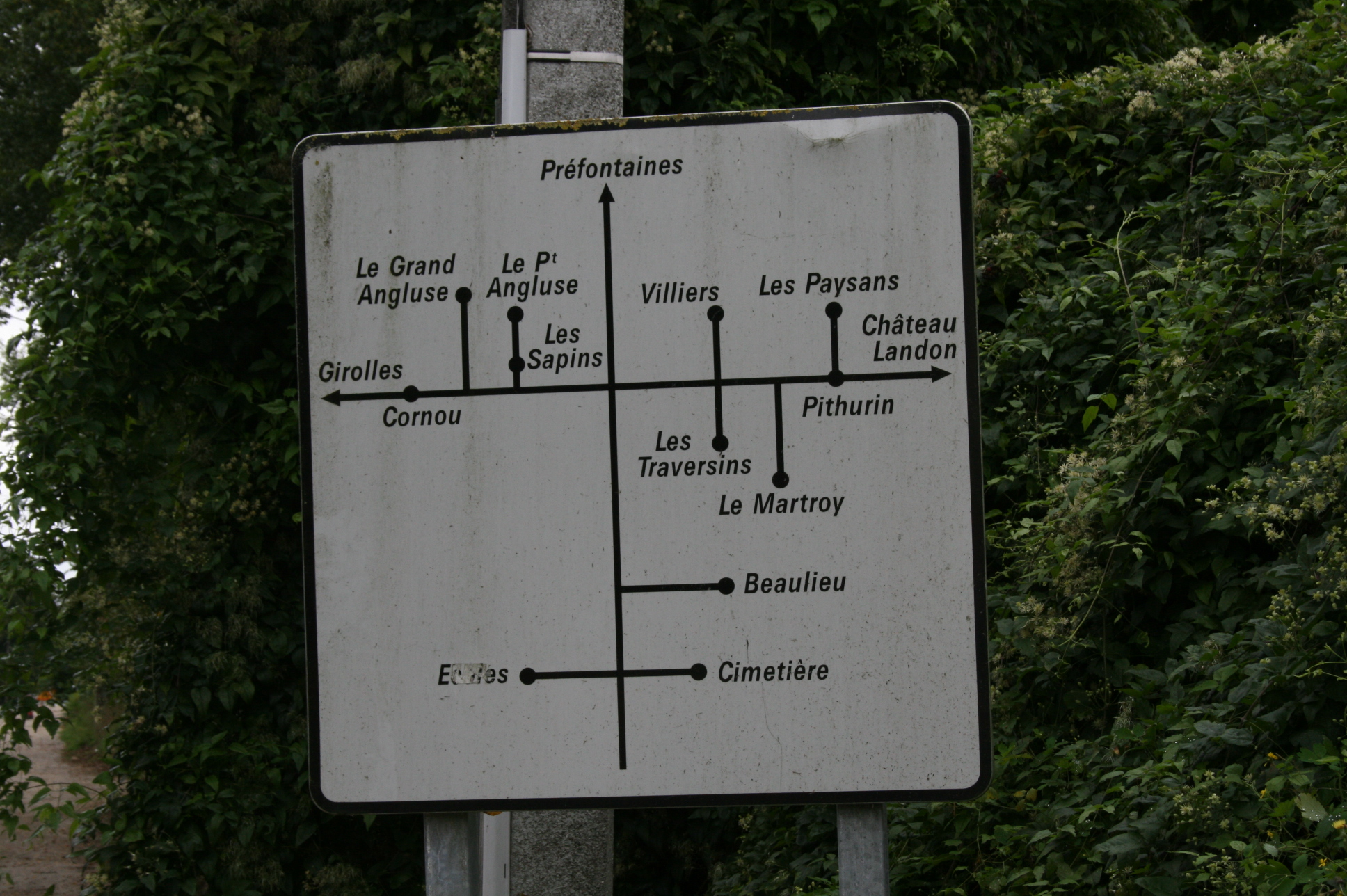 Panneau diagrammatique non normé